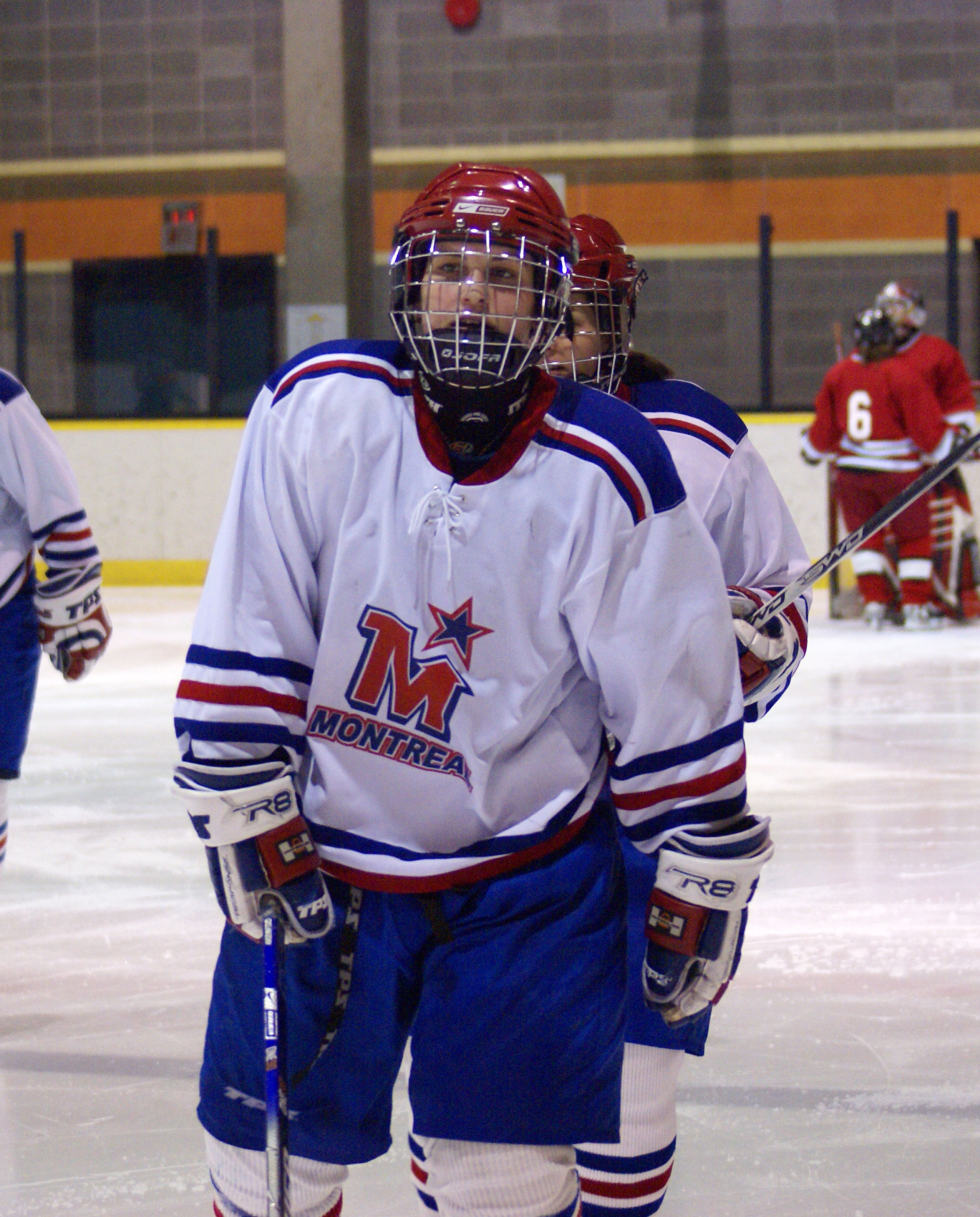 Marie-Philip Poulin